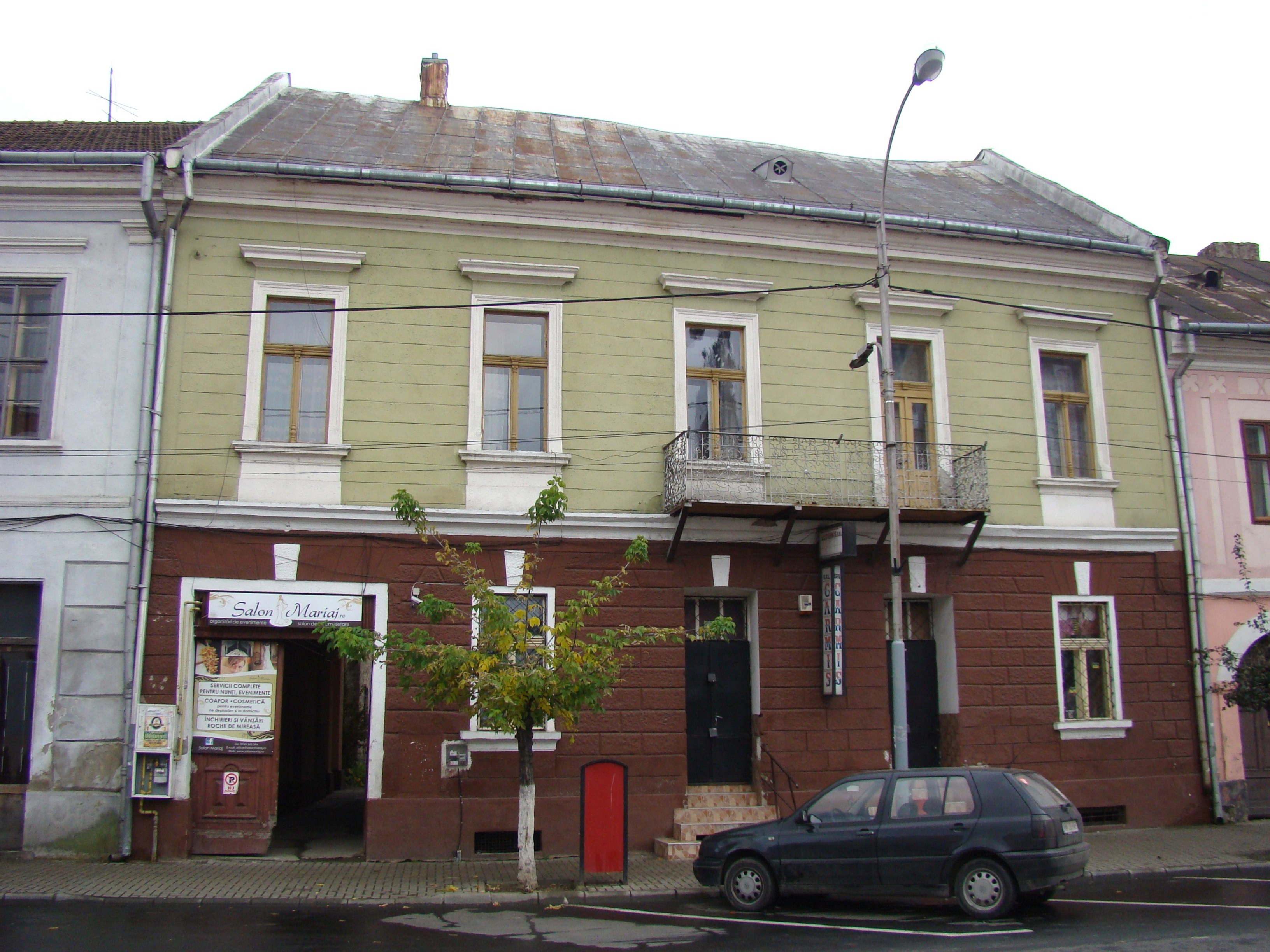 Casa Junger, municipiul Sighetu Marmației, Str. Mihaly Ioan de Apșa 19